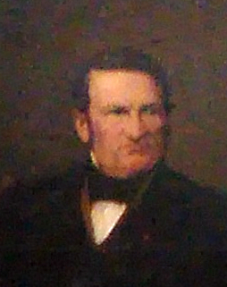 Ölgemälde, etwa 1875 entstanden